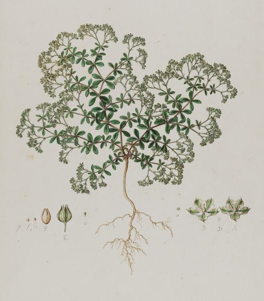 Polycarpon tetraphyllum subsp. tetraphyllum